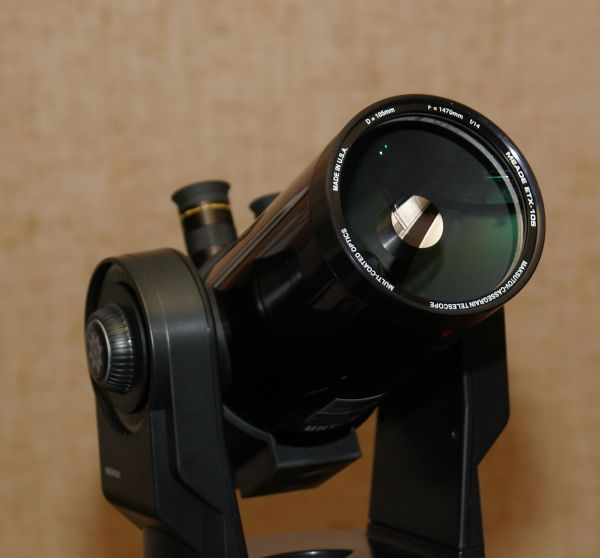 Maksutov telescoop, eigen foto Caseman, gemaakt 25 september 2004.